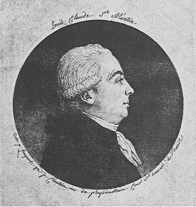 Portät (Physionotrace) des Philosophen Louis-Claude de Saint-Martin von Gilles-Louis Chrétien (1754 - 1811). ].